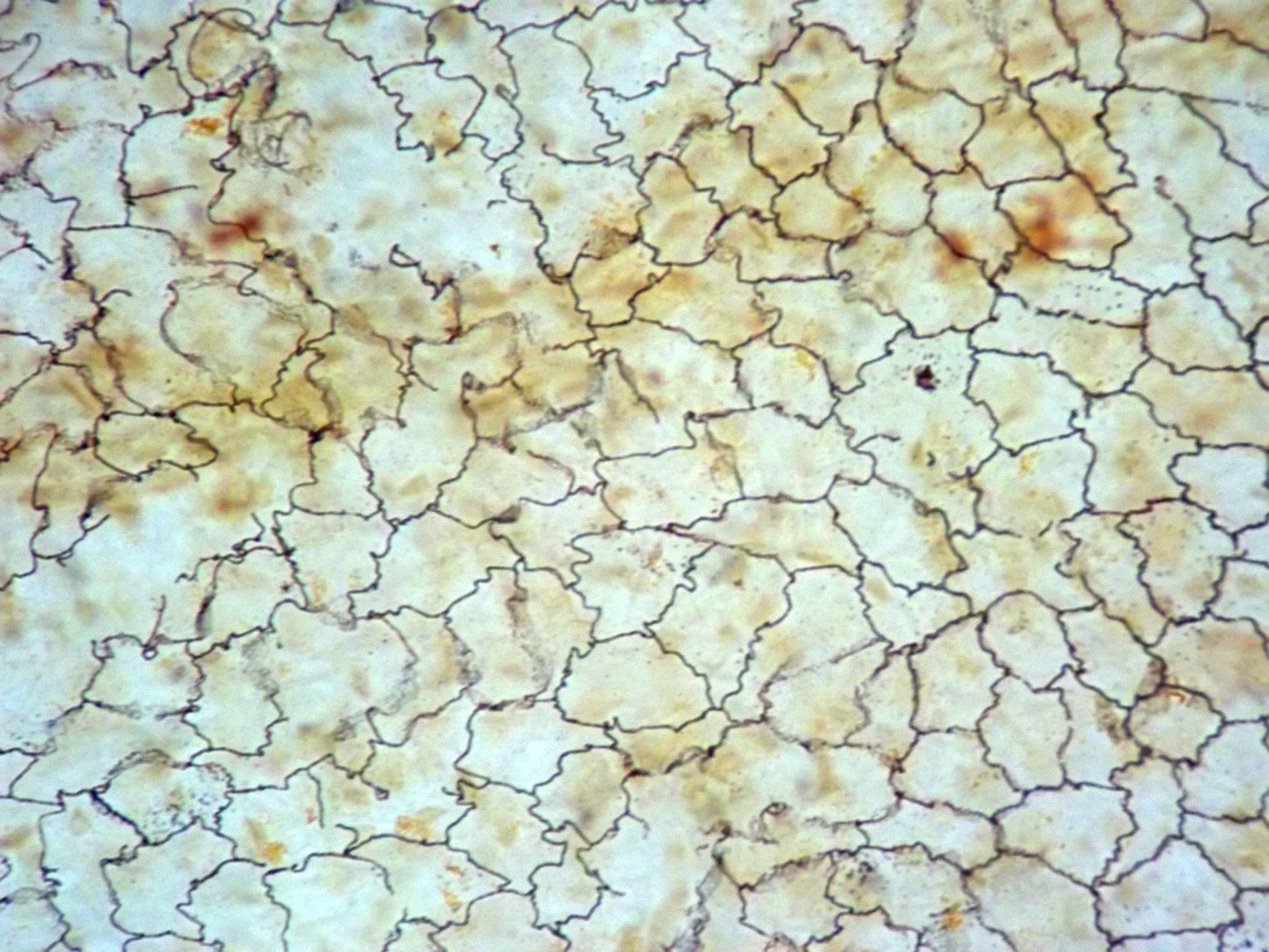 Endotelio (mesotelio): peritoneo. Vista superior. Tinción argéntica, 400X. Solo se ve la matriz extracelular, pues con esta técnica las células no son visibles.